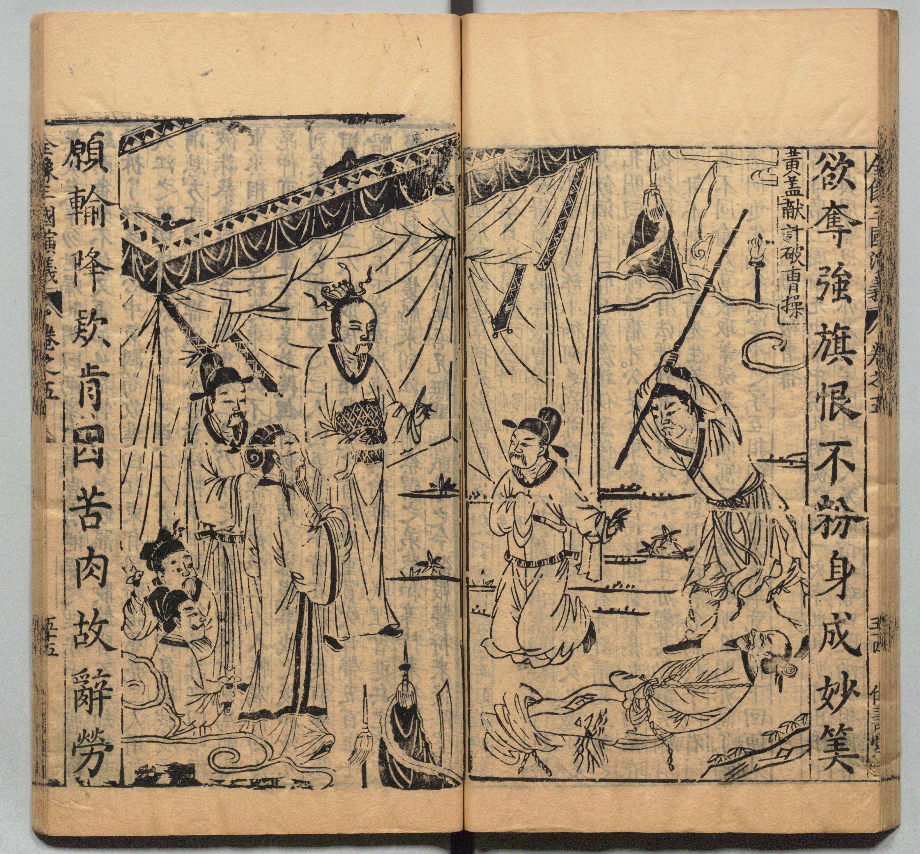 新刊校正古本大字音释三国志通俗演义 明万历十九年书林周曰校刊本